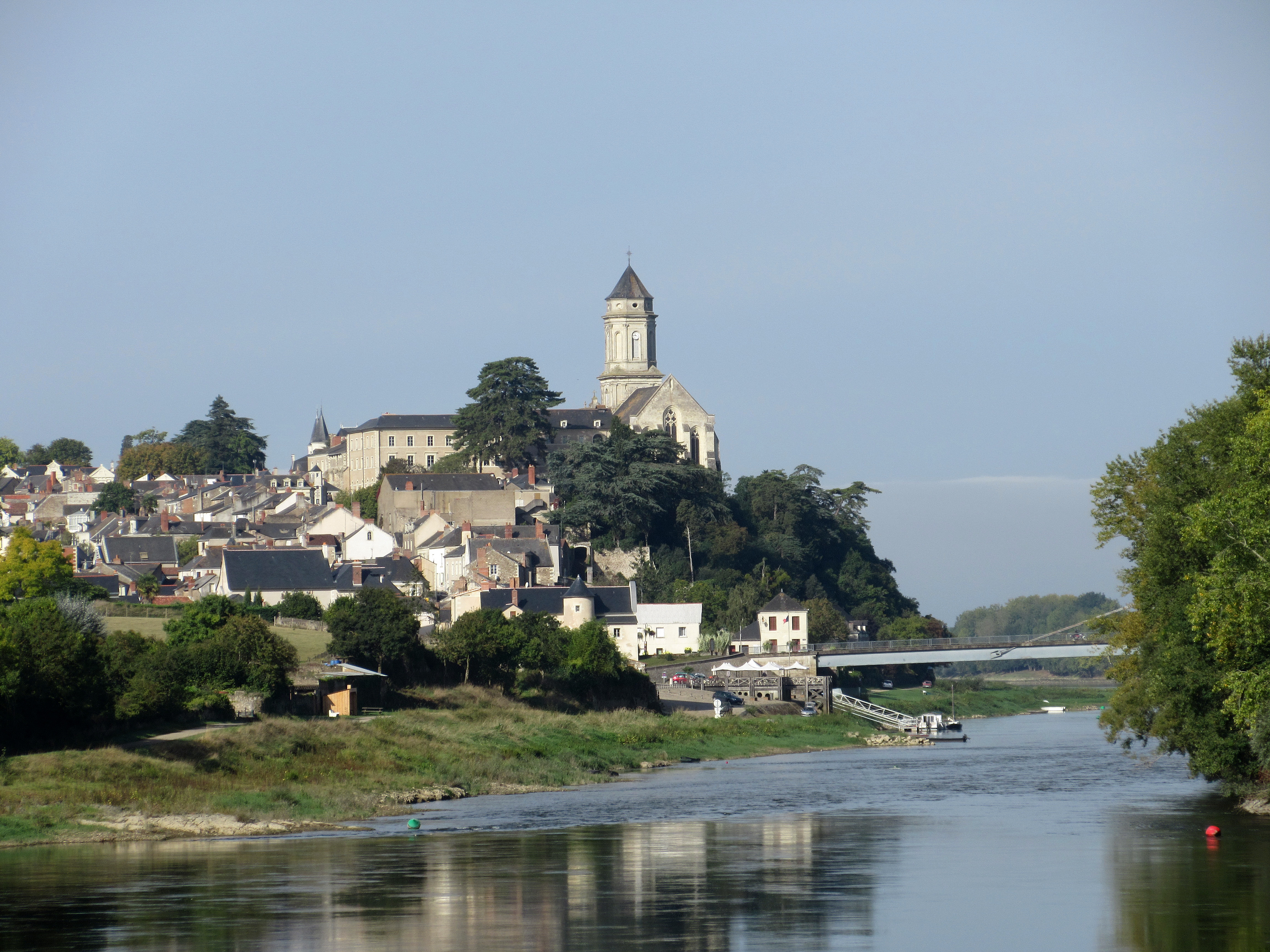 Vue de Saint-Florent-le-Vieil (Maine-et-Loire, France) depuis les bords de Loire.